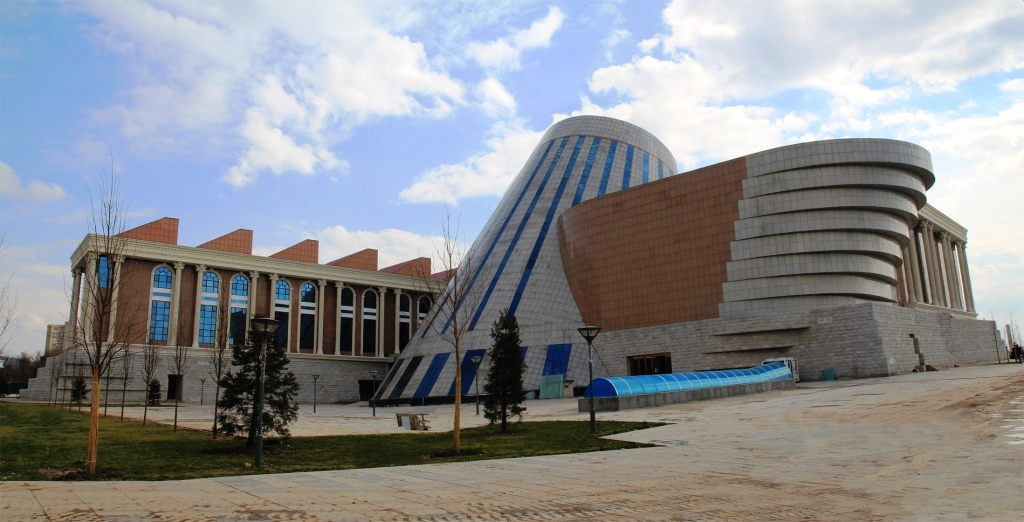 Национальный музей Таджикистана - новое здание музея, 2013 год, Душанбе